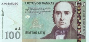 Lithuania 100 litu 2007